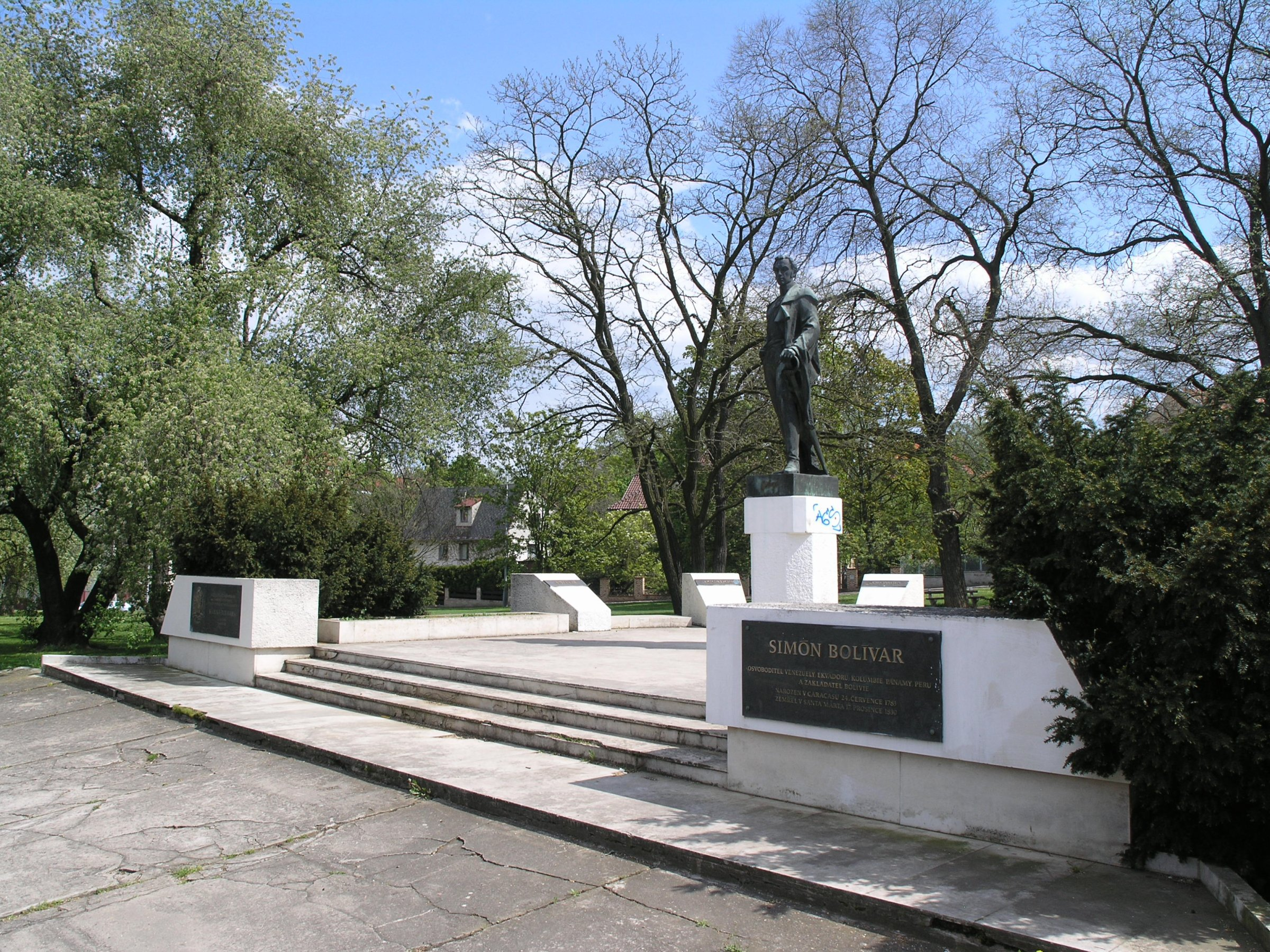 Praha-Bubeneč, památník Simóna Bolívara v parku Generála Lázaro Cárdenase